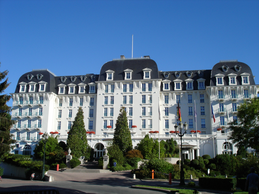 L'Impérial Palace au bord du lac d'Annecy durant l'été 2005.